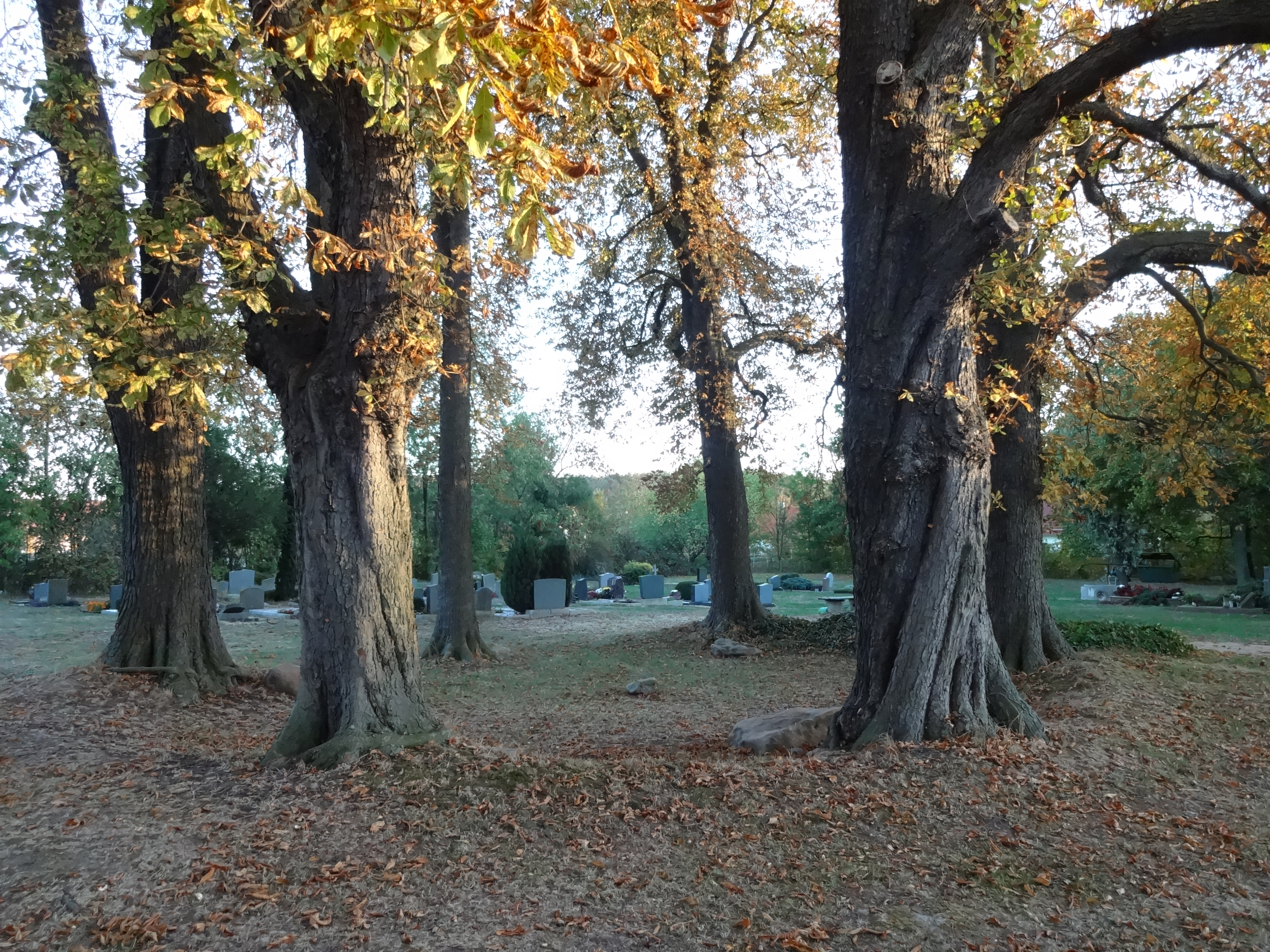 denkmalgeschützte Gerichtsstätte oder Thingstätte in Darlingerode